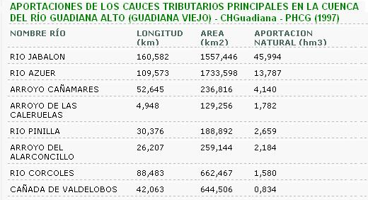 Sinopsis ríos tributarios del Campo de Montiel al Río Guadiana Viejo